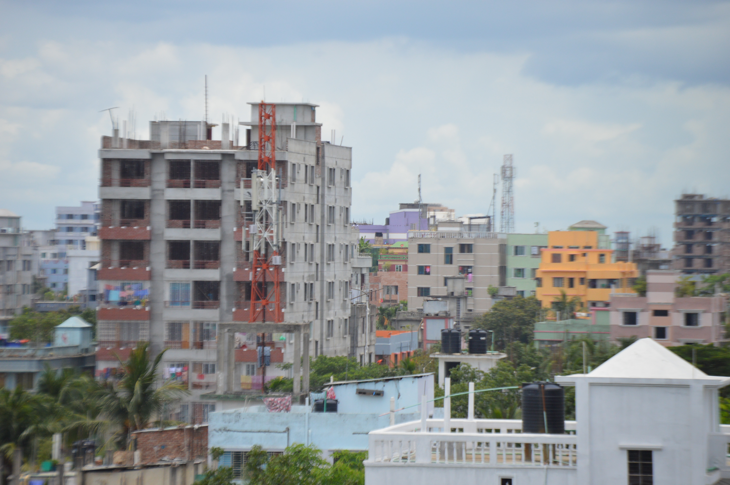 Landscape of Comilla City